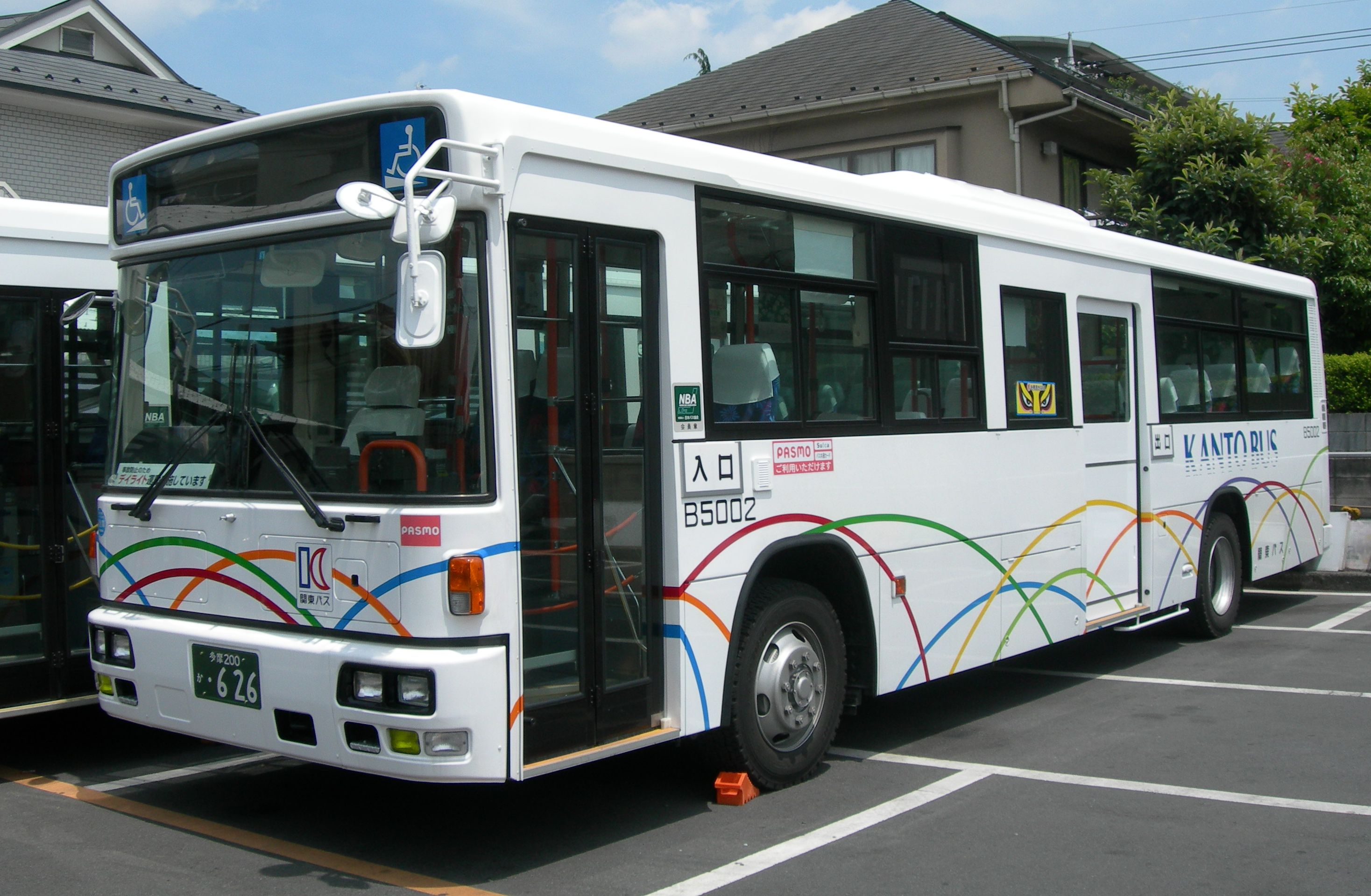 関東バスの深夜中距離バス銀座・新宿～三鷹線専用車